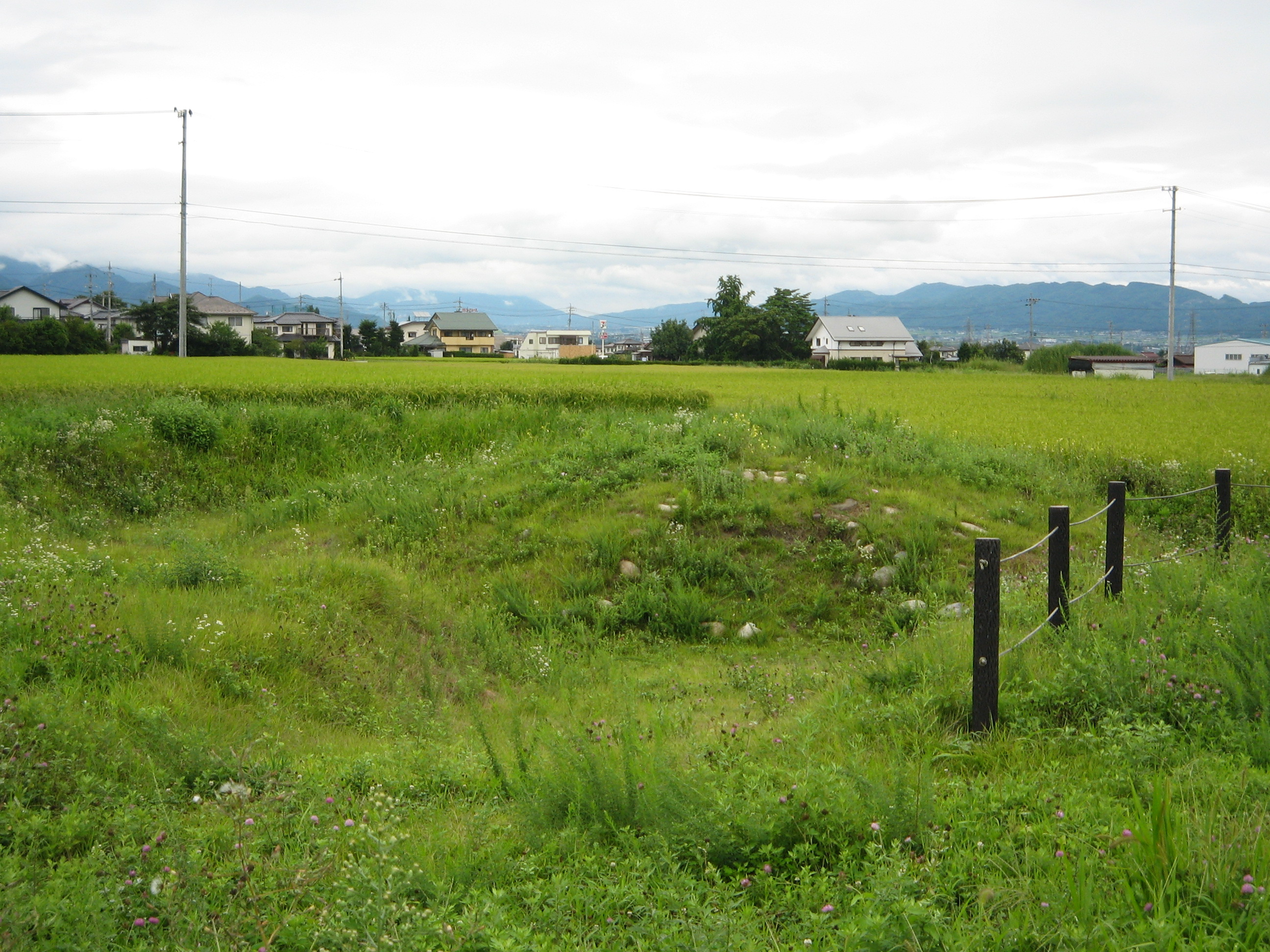 穂高古墳群に属する上原古墳（G1古墳）。円墳。